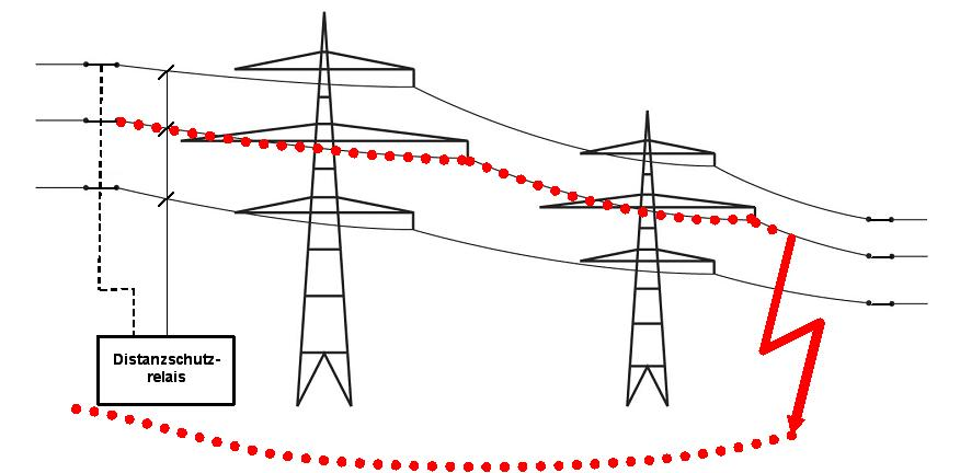 Schematische Impedanz einer Hochspannungsleitung bei Leiter-Erde-Schluss.